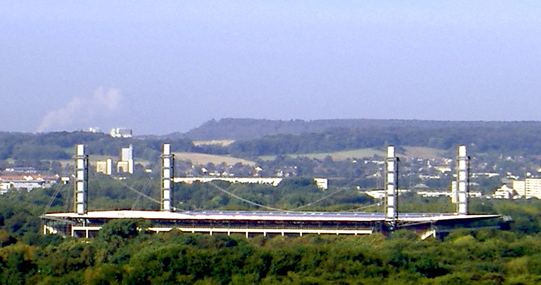 Köln-Müngersdorf